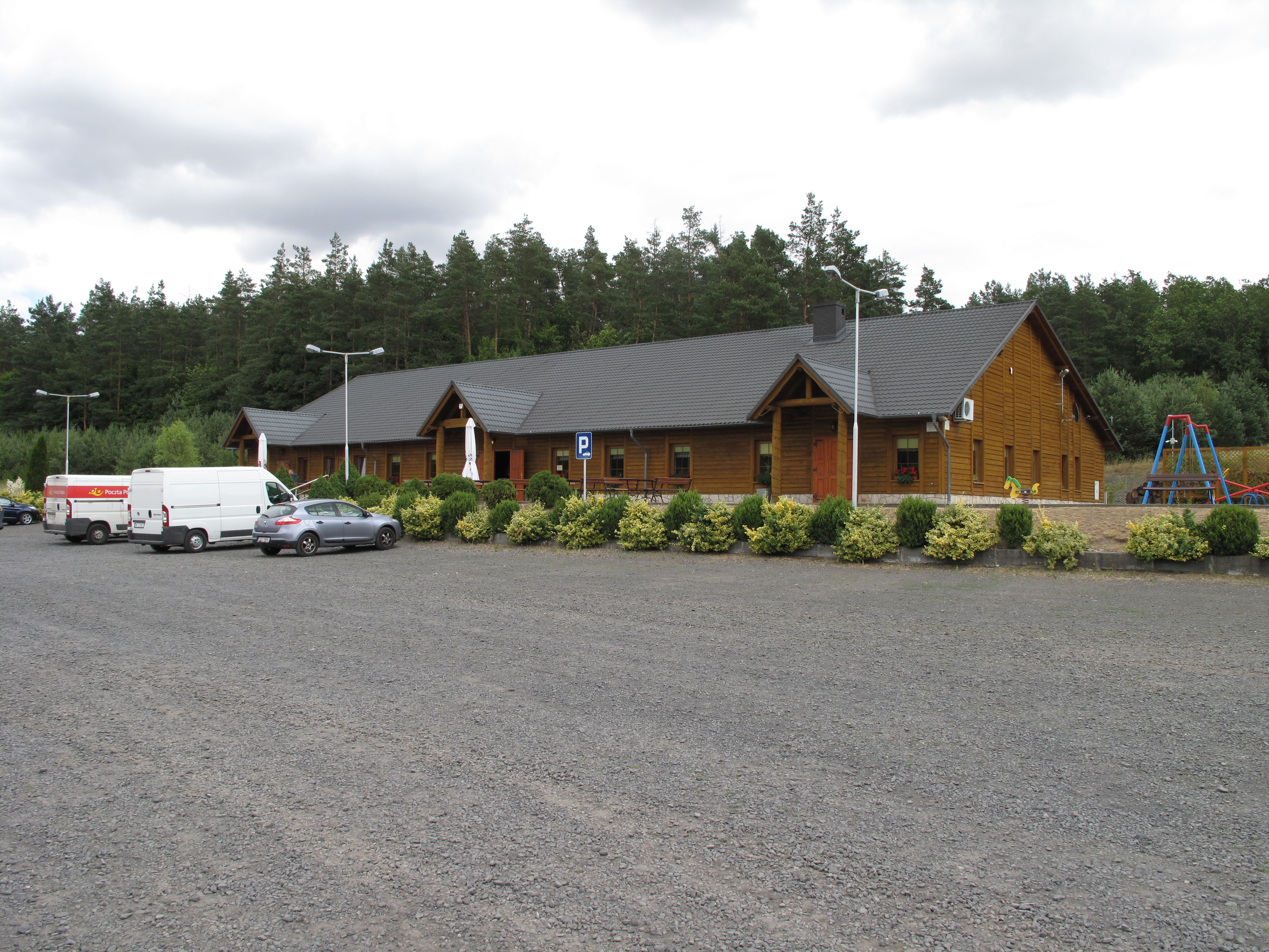 Nowa Ziemia (województwo dolnośląskie). Polska.